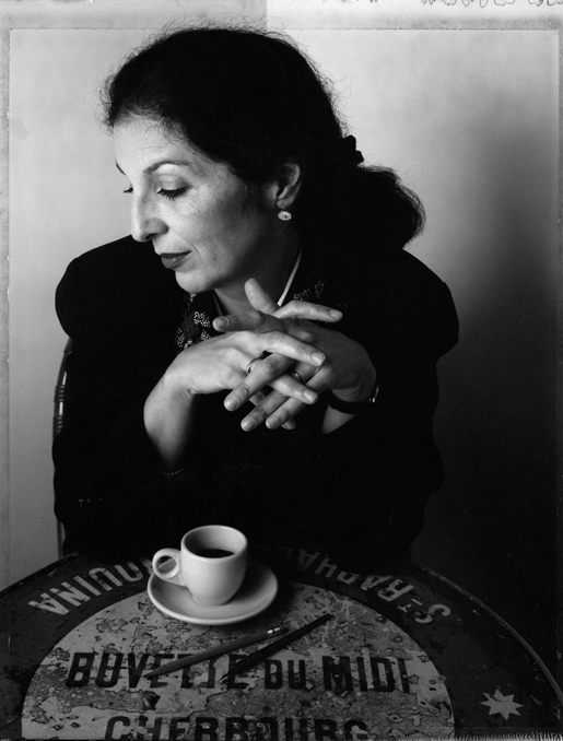 Louise Fili